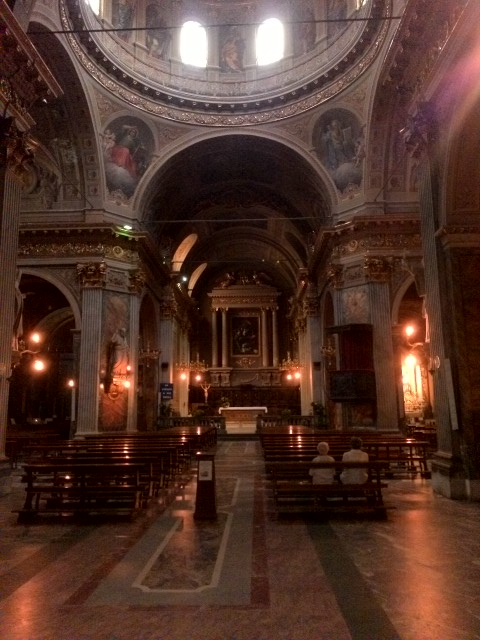 intérieur d'une église de Cuneo